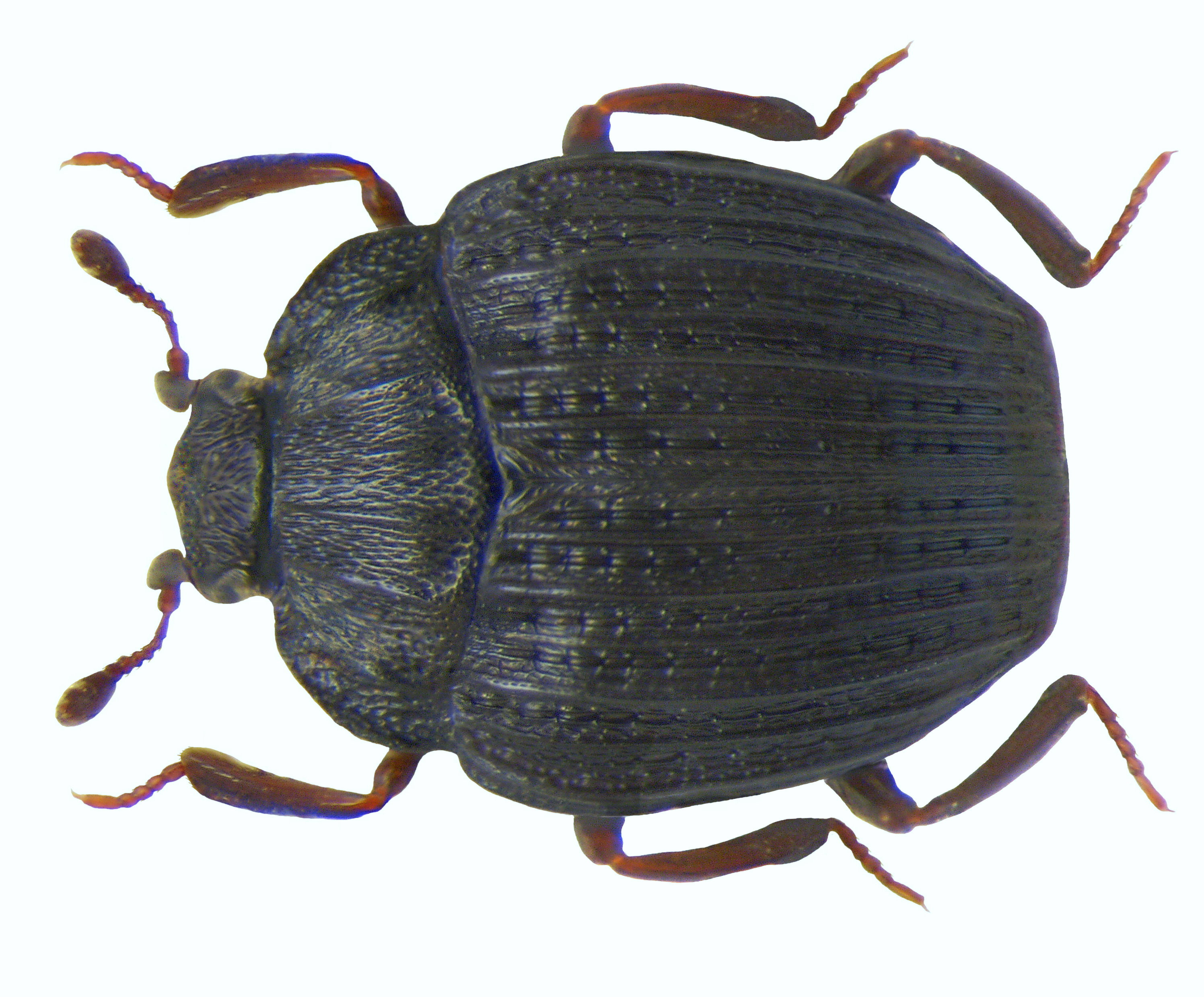 Familie: Histeridae Grösse: 2-2,5 mm Verbreitung: Europa Ökologie: unter faulenden Pflanzen, im Dung, an Aas und Pilzen Fundort: Austria, Kärnten, Kleinkirchheim leg.det. U.Schmidt, 1972 Foto: U.Schmidt, 2008